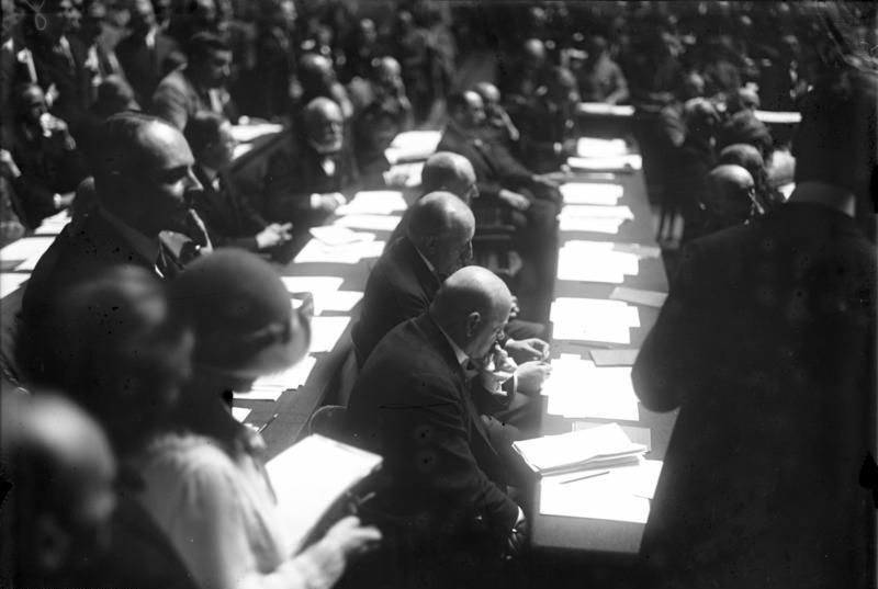 Der deutsche Reichsaussenminister und Friedens-Nobel-Preisträger Dr. Stresemann gestorben! Aus dem Wirken des Reichsaussenministers Dr. Stresemann! Reichsaussenminister Dr. [Gustav] Stresemann im Völkerbund. Vorn Reichsaussenminister Dr. Stresemann, dahinter Staatssekretär [Karl] von Schubert nach dem ersten Eintritt in den Völkerbund. ("The late German Reich Foreign Minister and Nobel Peace Prize winner Dr. Stresemann! From the work of the Reich Foreign Minister Dr. Stresemann!" "Reich Foreign Minister [Gustav] Stresemann in the League of Nations. Front: Reich Foreign Minister Dr. Stresemann, State Secretary [Karl] von Schubert; after the first entry into the League of Nations.") (Dr. Stressman died in 1929).